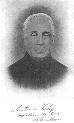 Dominic Anthony Fahy (1805-1071), sacerdote irlandés y virtual jefe de la comunidad irlandesa en Argentina entre 1844 hasta 1871.